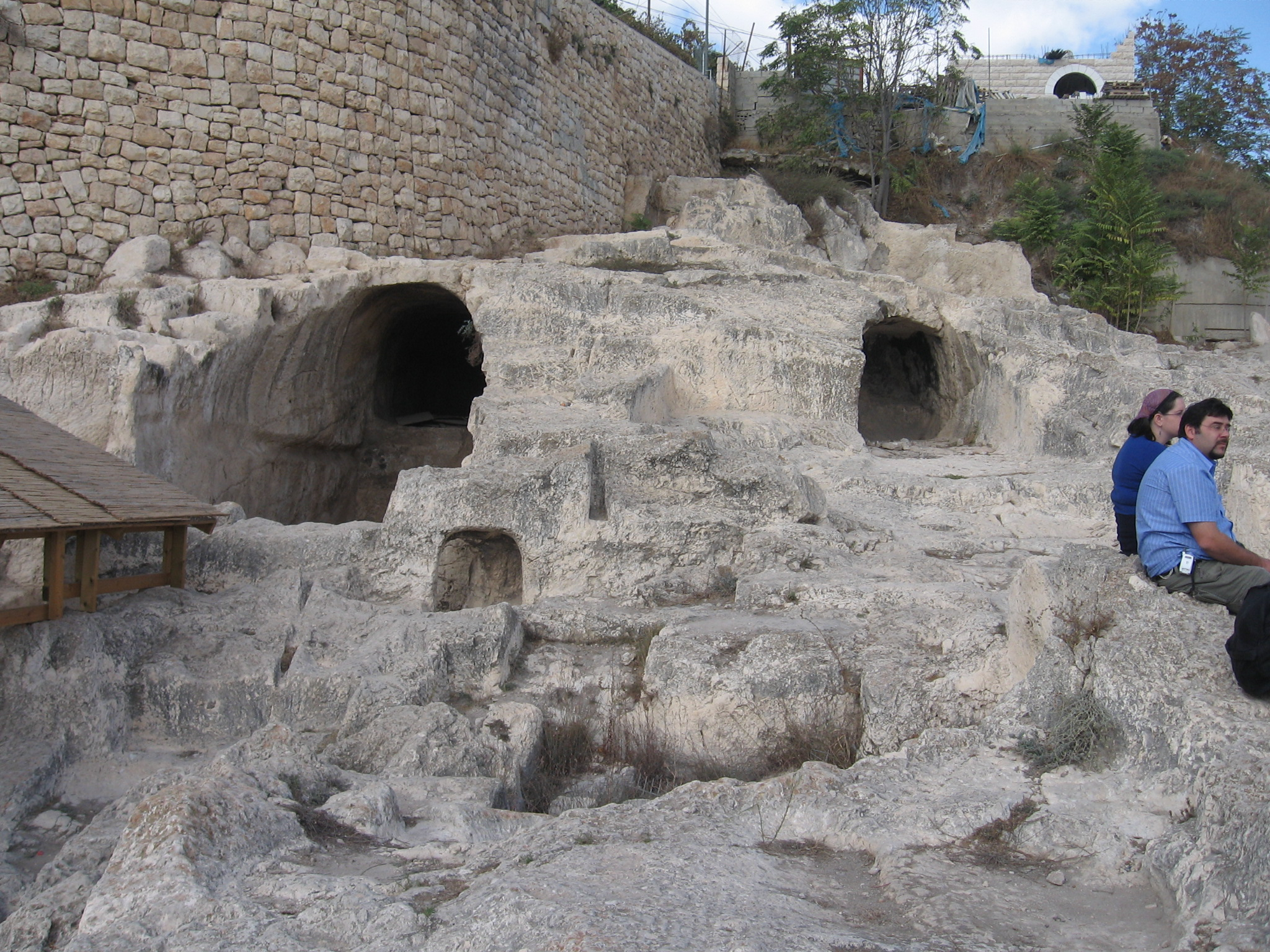 MAY BE THE KINGS TOMS